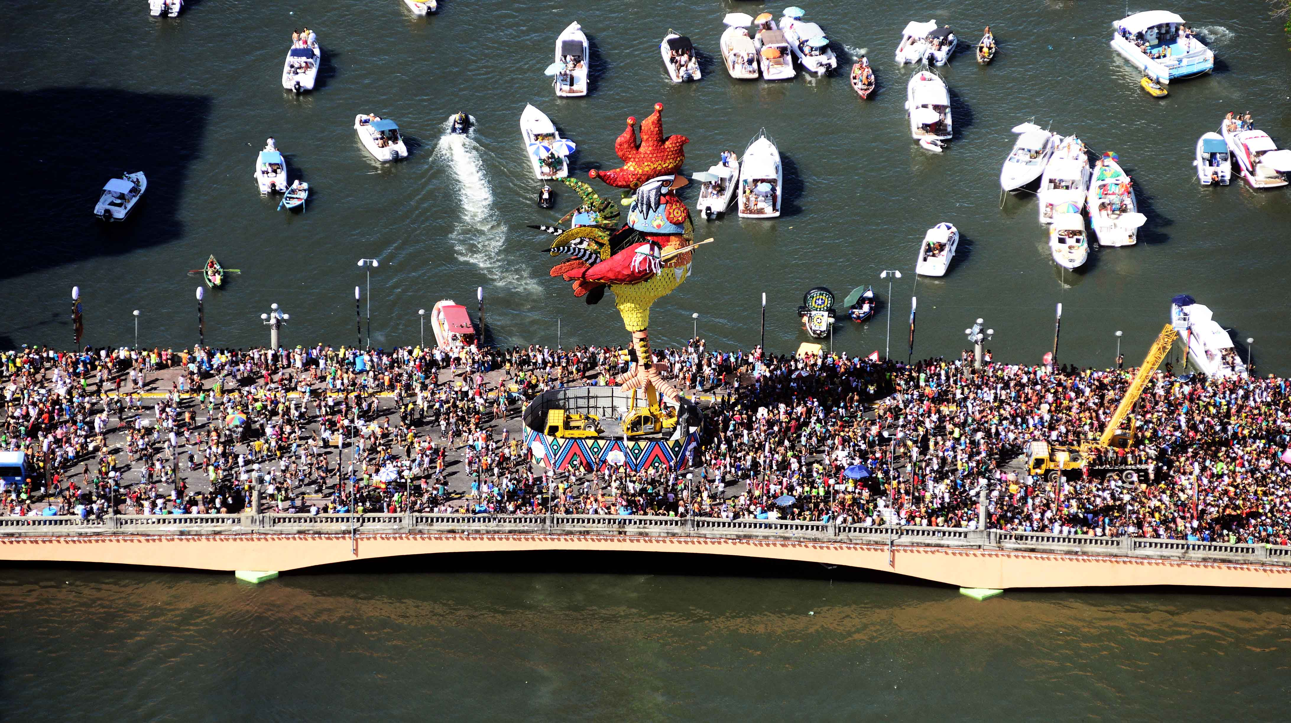 Galo da Madrugada no Carnaval do Recife - Pernambuco, Brasil